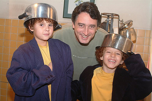 Os atores Pedro Saback e Felipe Severo ao lado do também ator Eduardo Galvão